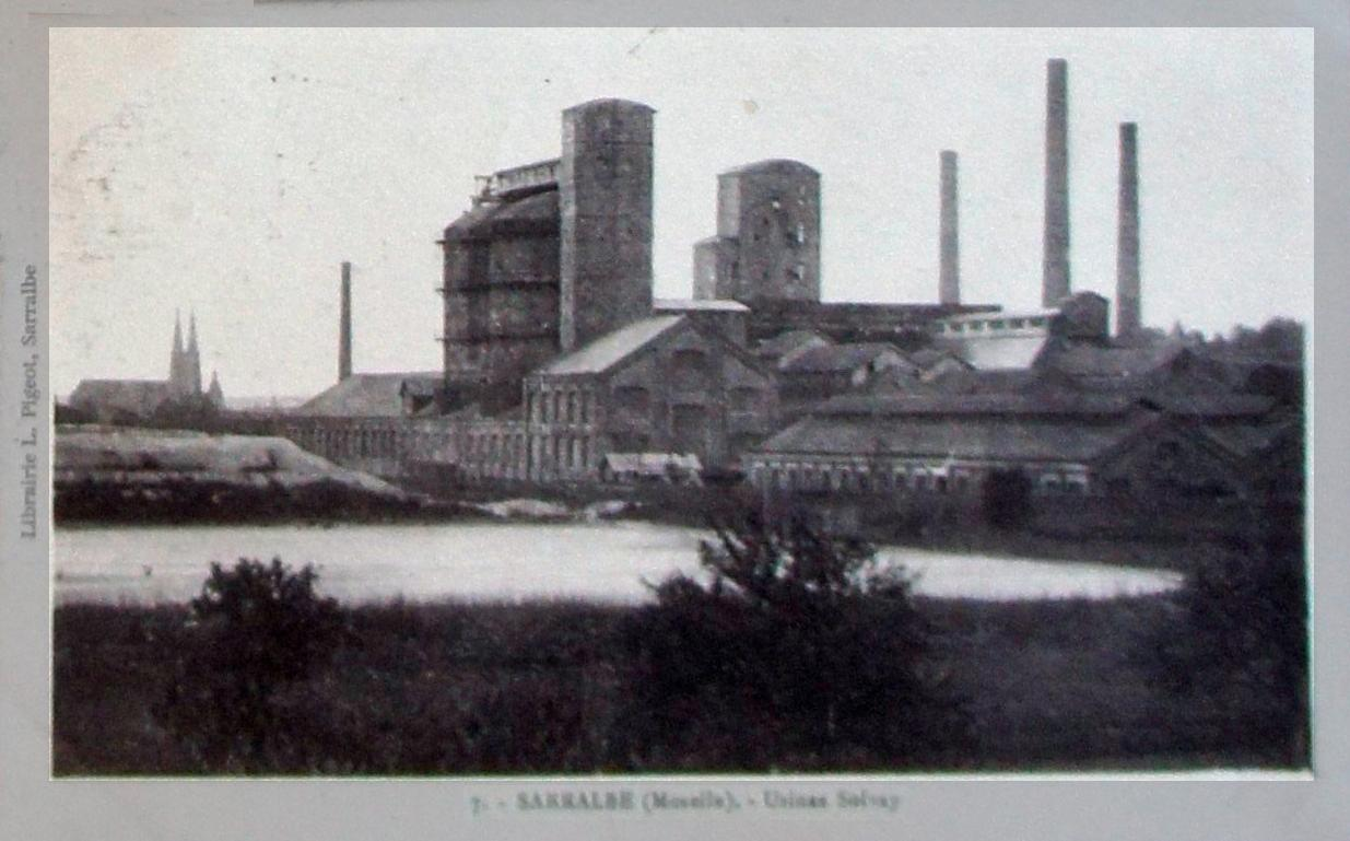 carte postale envoyée en 1924 montrant Sarralbe, l'usine Solvay et l'église .